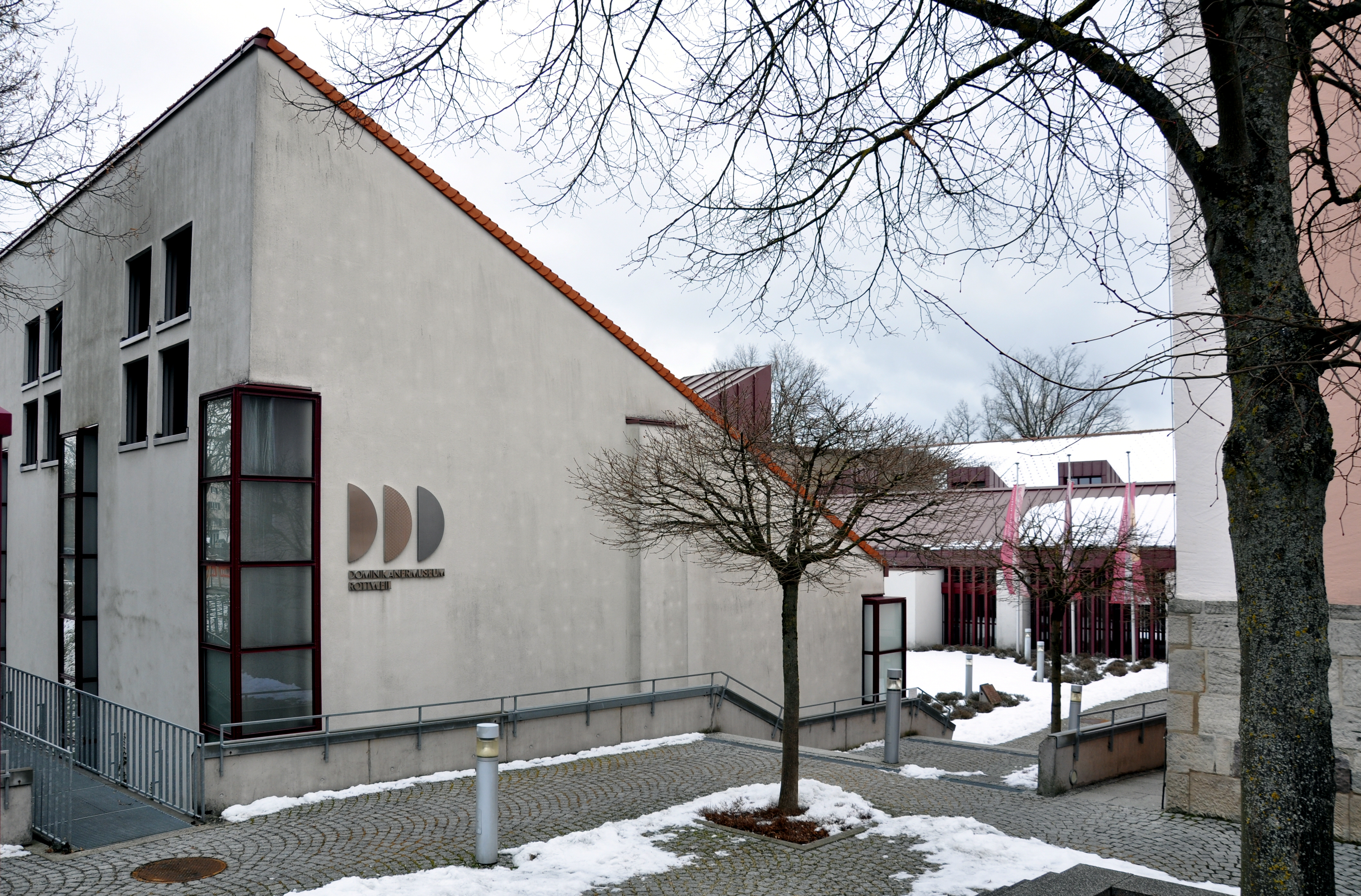 Rottweil, Dominikanermuseum